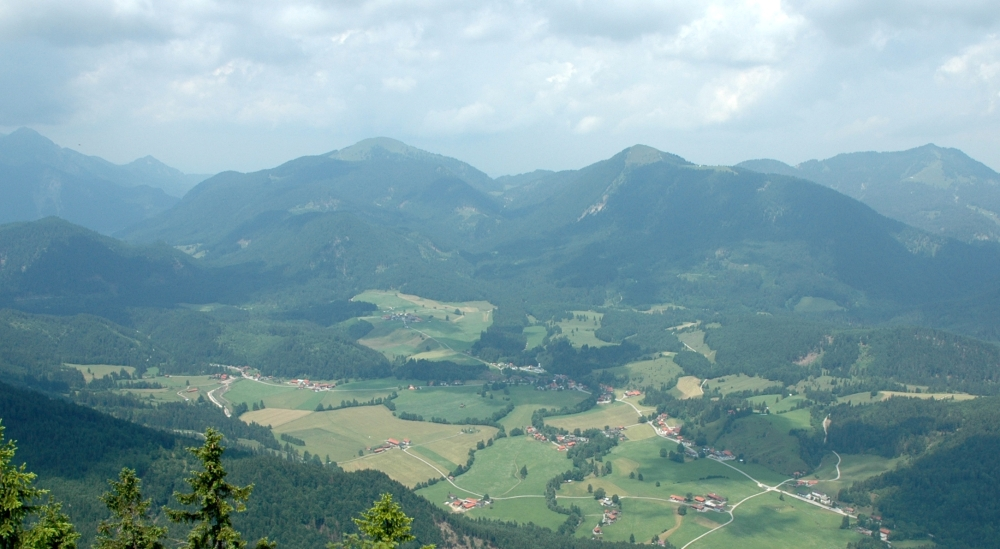 Die Gemeinde Jachenau aus der Vogelperspektive